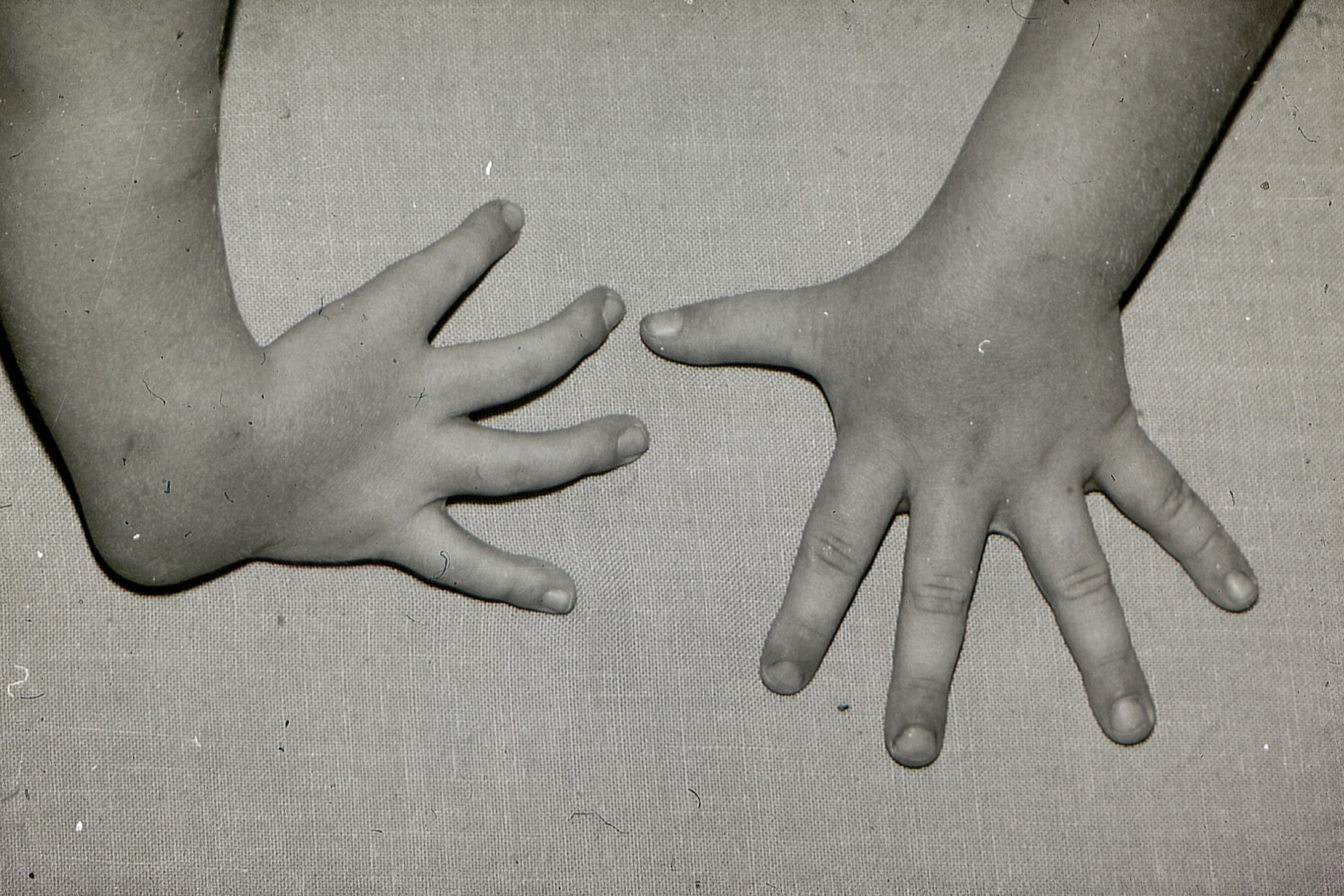 Fotografie der Hände eines fast 5-jährigen Kindes. Kongenitaler Radiusdefekt mit fehlendem Daumen rechts.